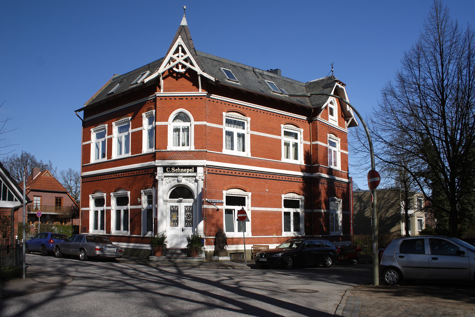 Ehemalige Eckkneipe Beese, Hamburg-Nienstedten